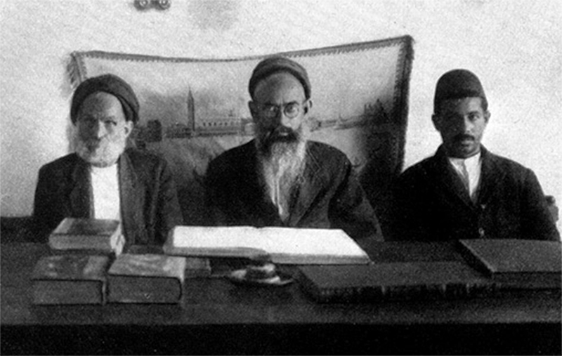 הרכב בית הדין בבנגאזי, לוב, שנת 1930 לערך. במרכז יושב הרב כמוס פלאח, ובצד שמאל הרב מרדכי הכהן